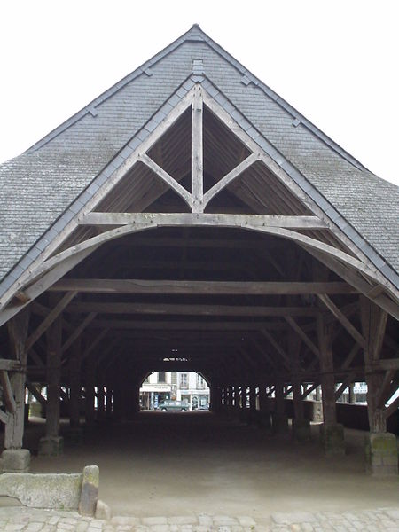 Photo réalisée par Grégory G. en septembre 2004